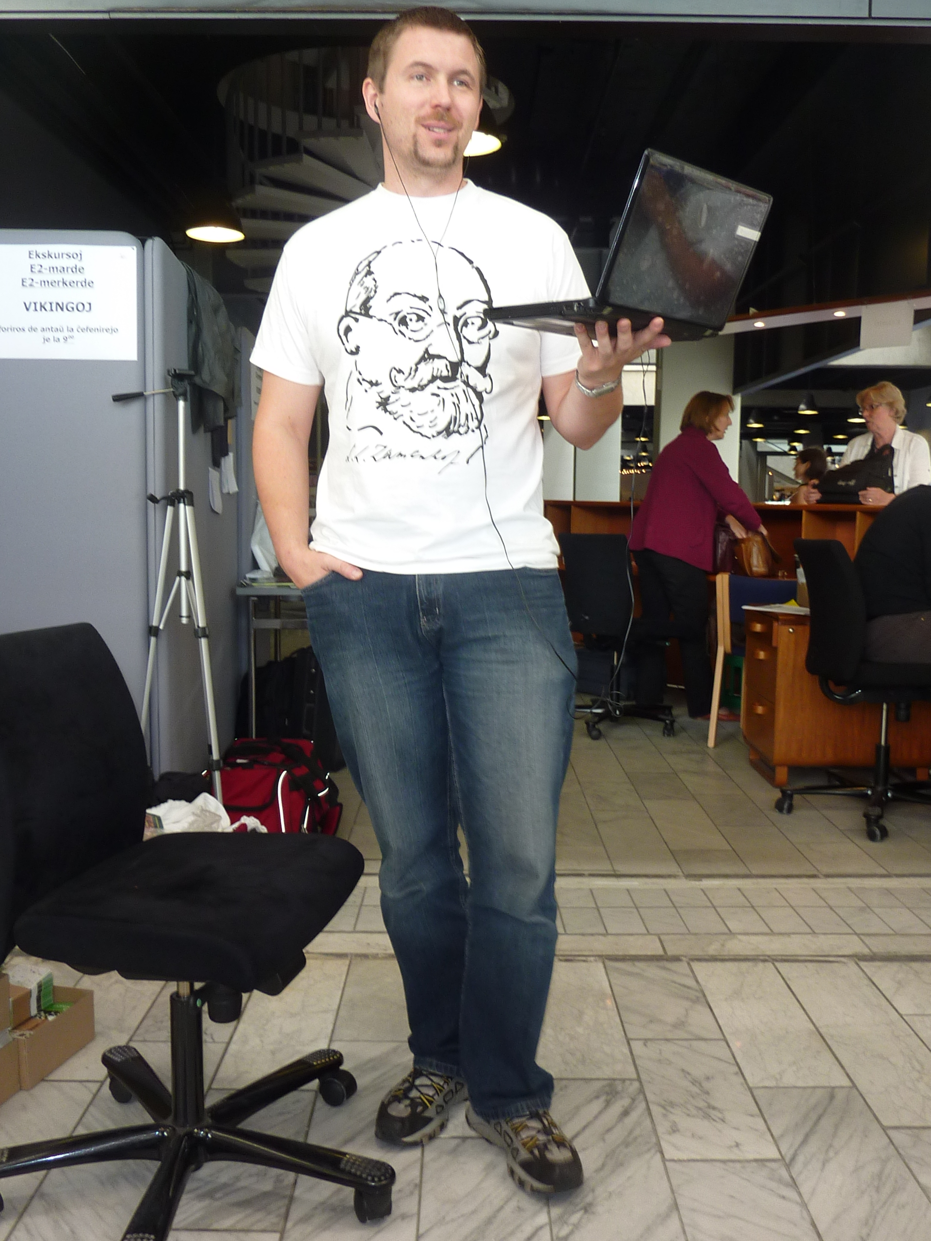 Peter Baláž (E@I) profitas la senkablan interretan konekton en la kongresejo de la 96-a UK en Kopenhago (2011) por per Skype-telefonalvoko kunordigi la organizadon de la tuj poste en Slovakio okazonta Somera Esperanto-Studado.